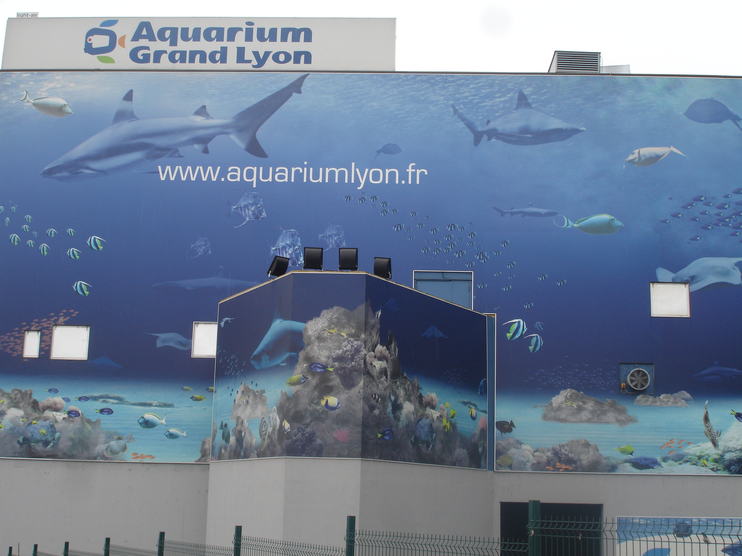 La Mulatière (69) : L'aquarium du Grand Lyon, mur côté est